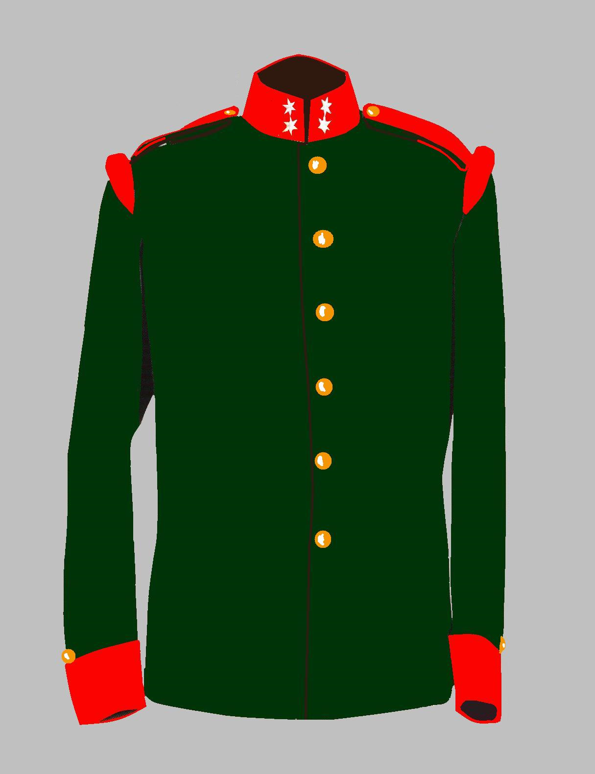 Waffenrock Mannschaften k.u.k. Geologisches Institut